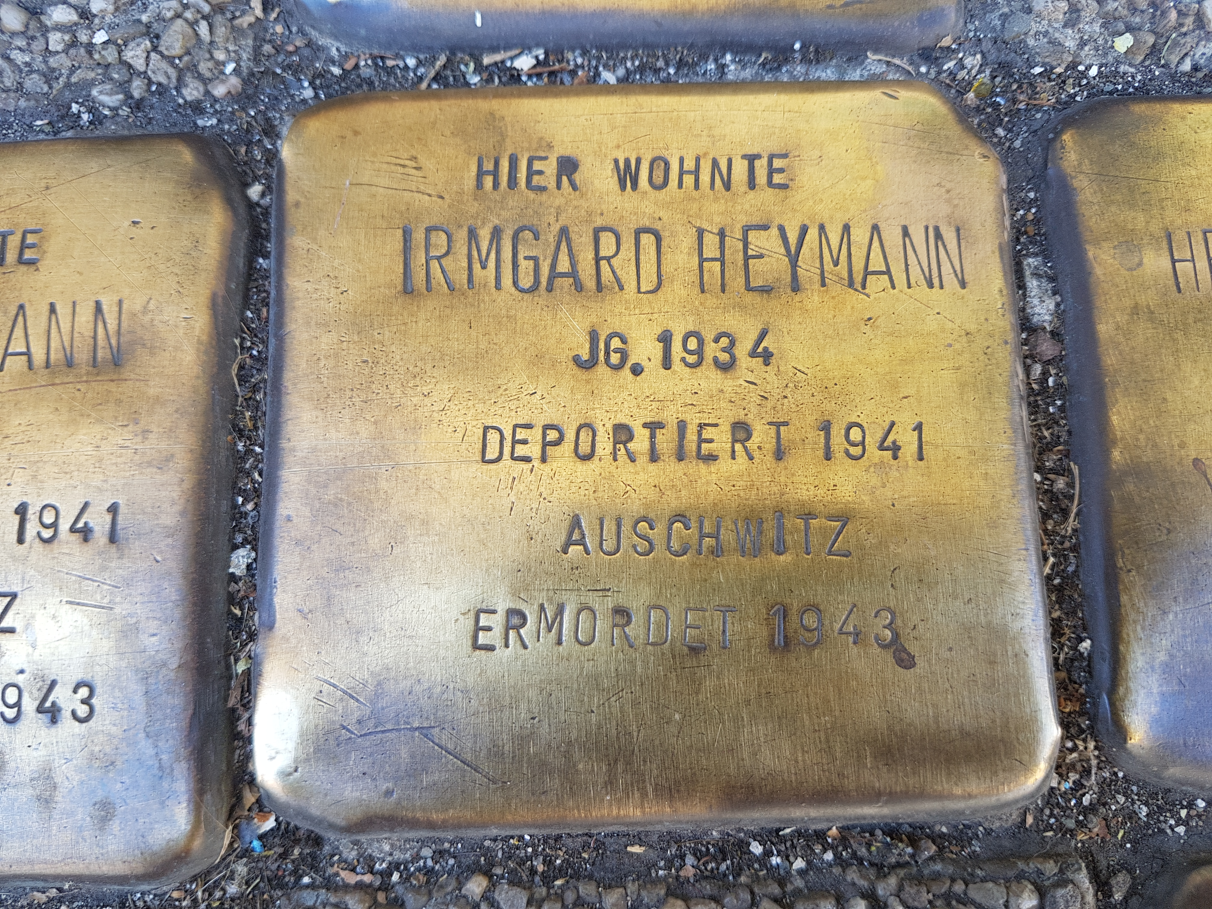 Stolperstein Duisburg Irmgard Heymann